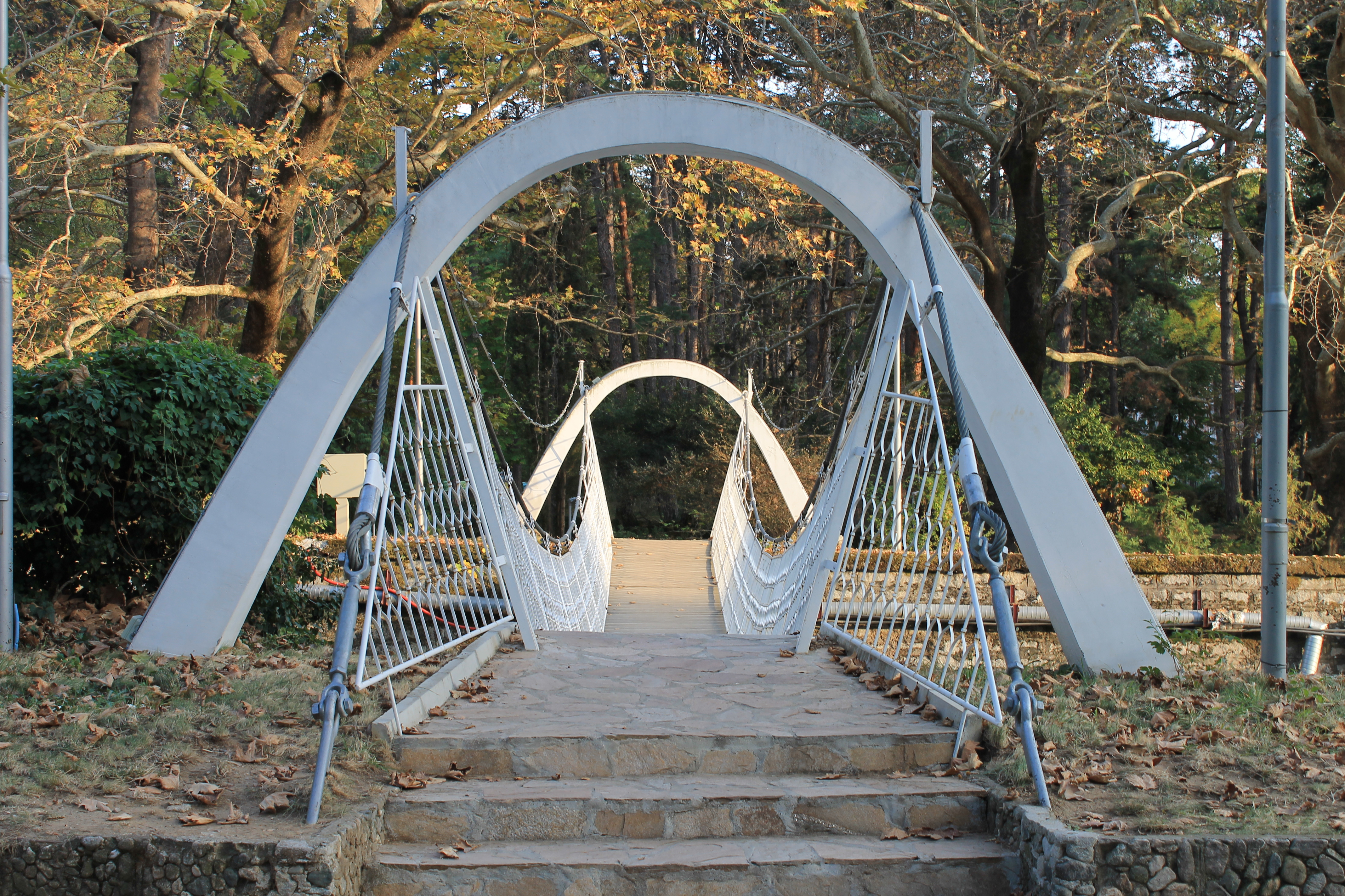 Въжените мостове в Сандански